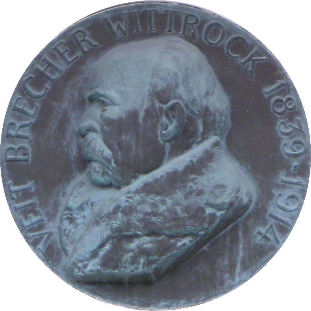 Botaniker Veit Wittrock (1839-1914), medaljong i Bergianska trädgården, Stockholm